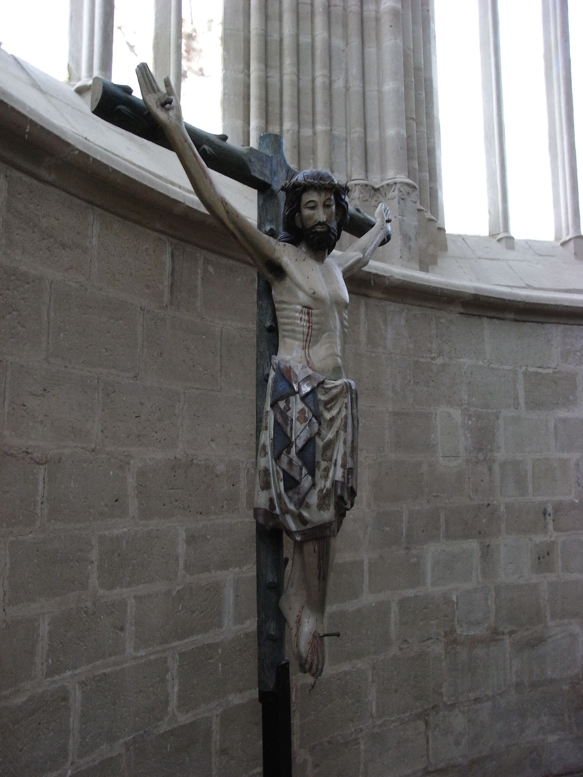 Cristo del Monasterio de Cañas